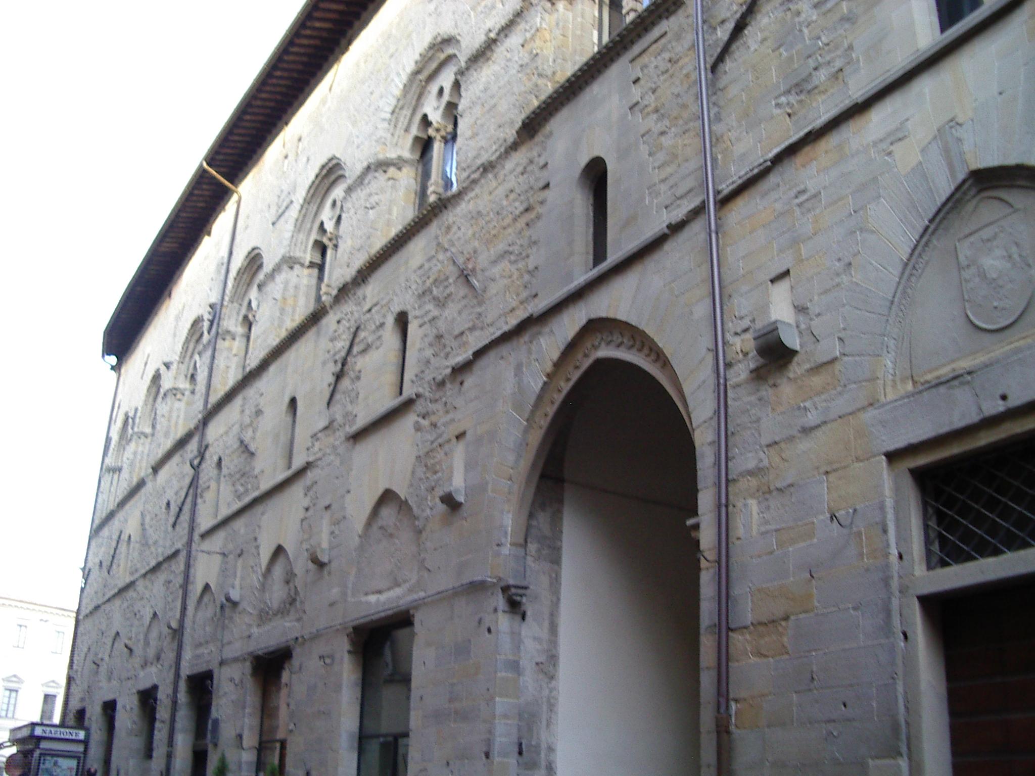 Palazzo del Podestà-Città di Castello-Province de Pérouse-Ombrie-Italie